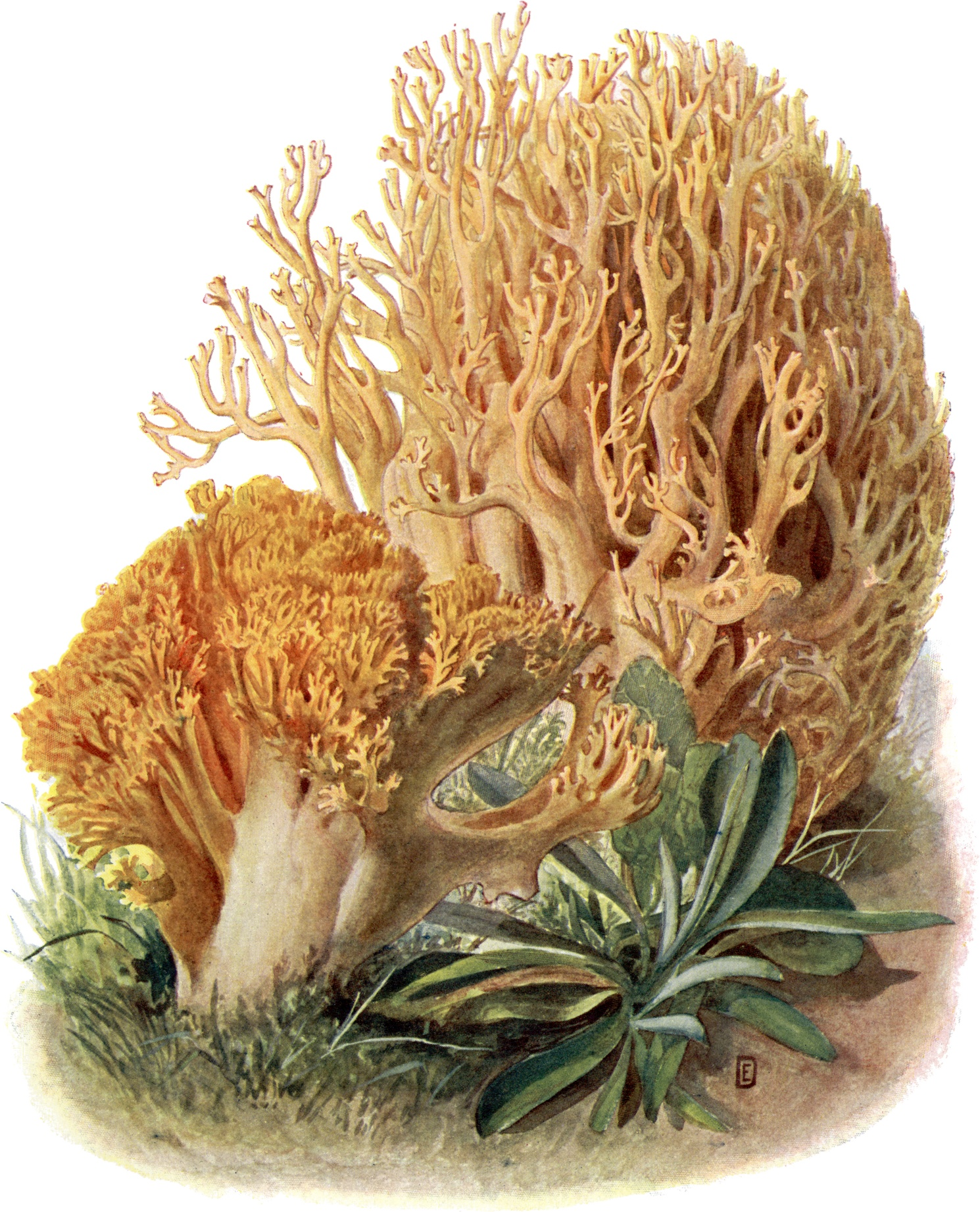 Gelber Ziegenbart, Clavaria flava. Eßbar.